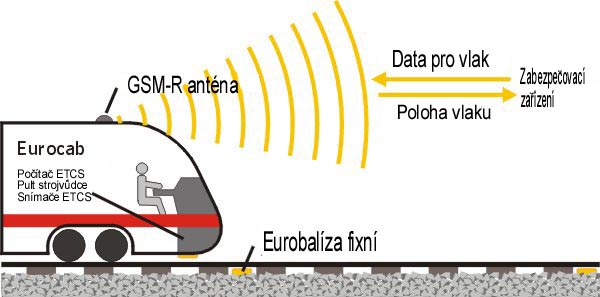 Princip funkce ETCS L3. Z německé wikipedie upravil PetrS. Zeichnung erstellt 10/2003 von Benutzer:Sansculotte. Bild ist unter der GNU FDL zur weiteren Verwendung freigegeben. Quellenangabe und Beleg an erbeten.